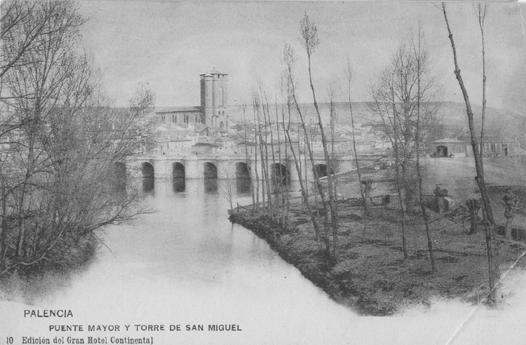 Puente Mayor y Torre de San Miguel - Palencia - Edición del Gran Hotel Continental - Postal 140 x 90 B/N